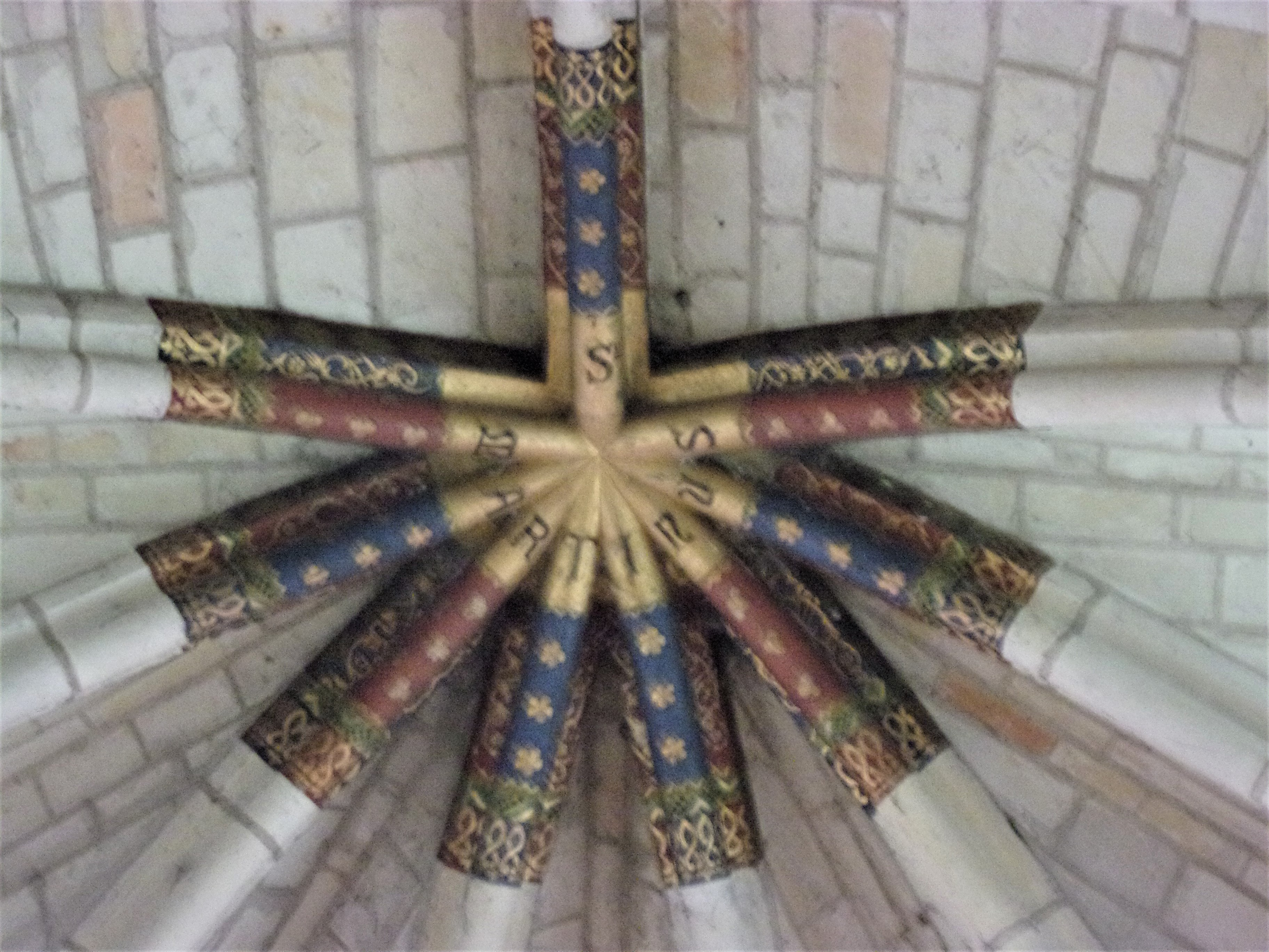 Détail de la voûte de l'église Saint-Martin